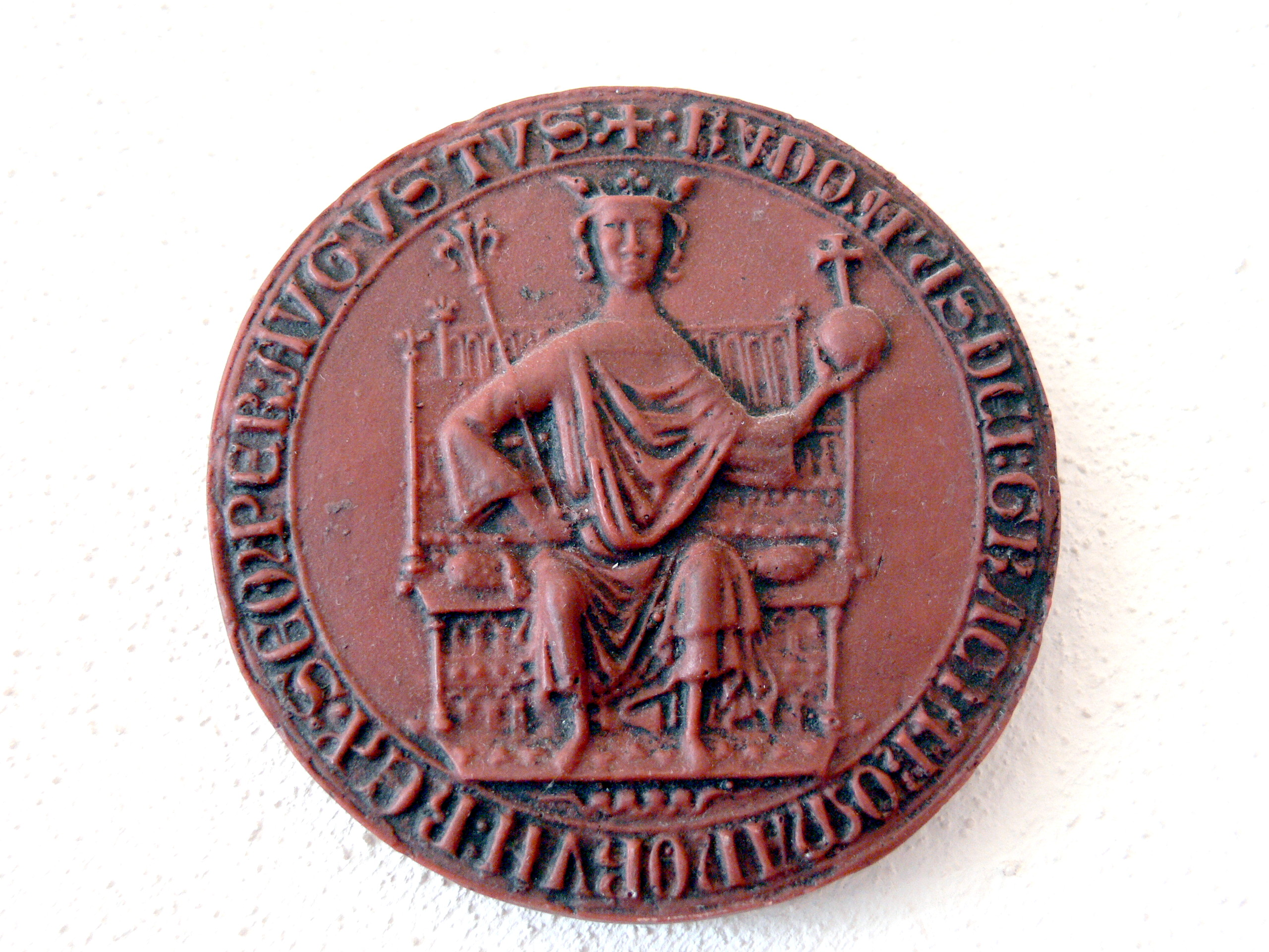 Siegel Kaiser Rudolfs I. von Habsburg